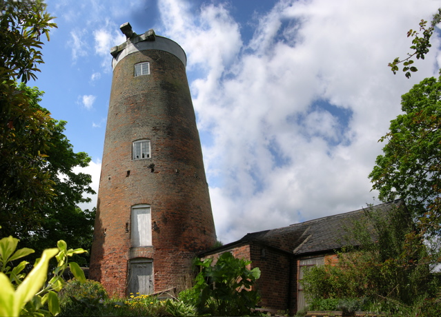 Ullesthorpe Mill